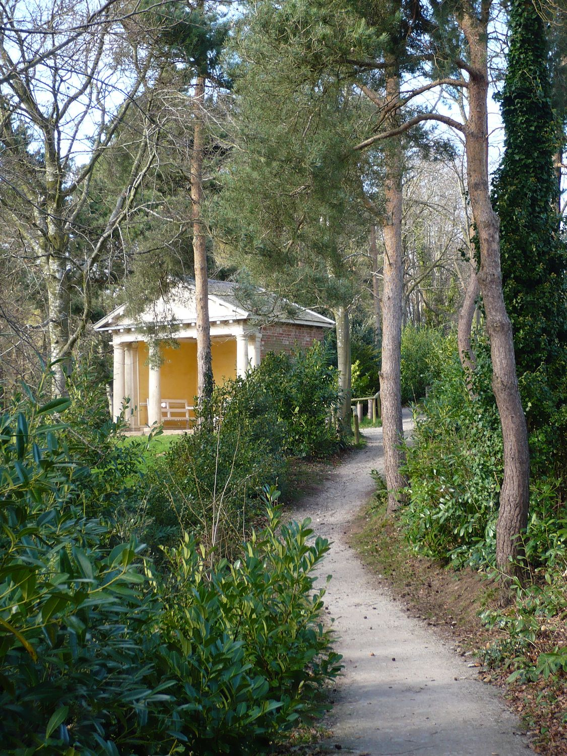 Hestercombe Gardens - Rekonstruierter antikisierender Tempel des Landschaftsgartens (2. Hälfte 18. Jahrhundert) von Coplestone Warre Bampfylde